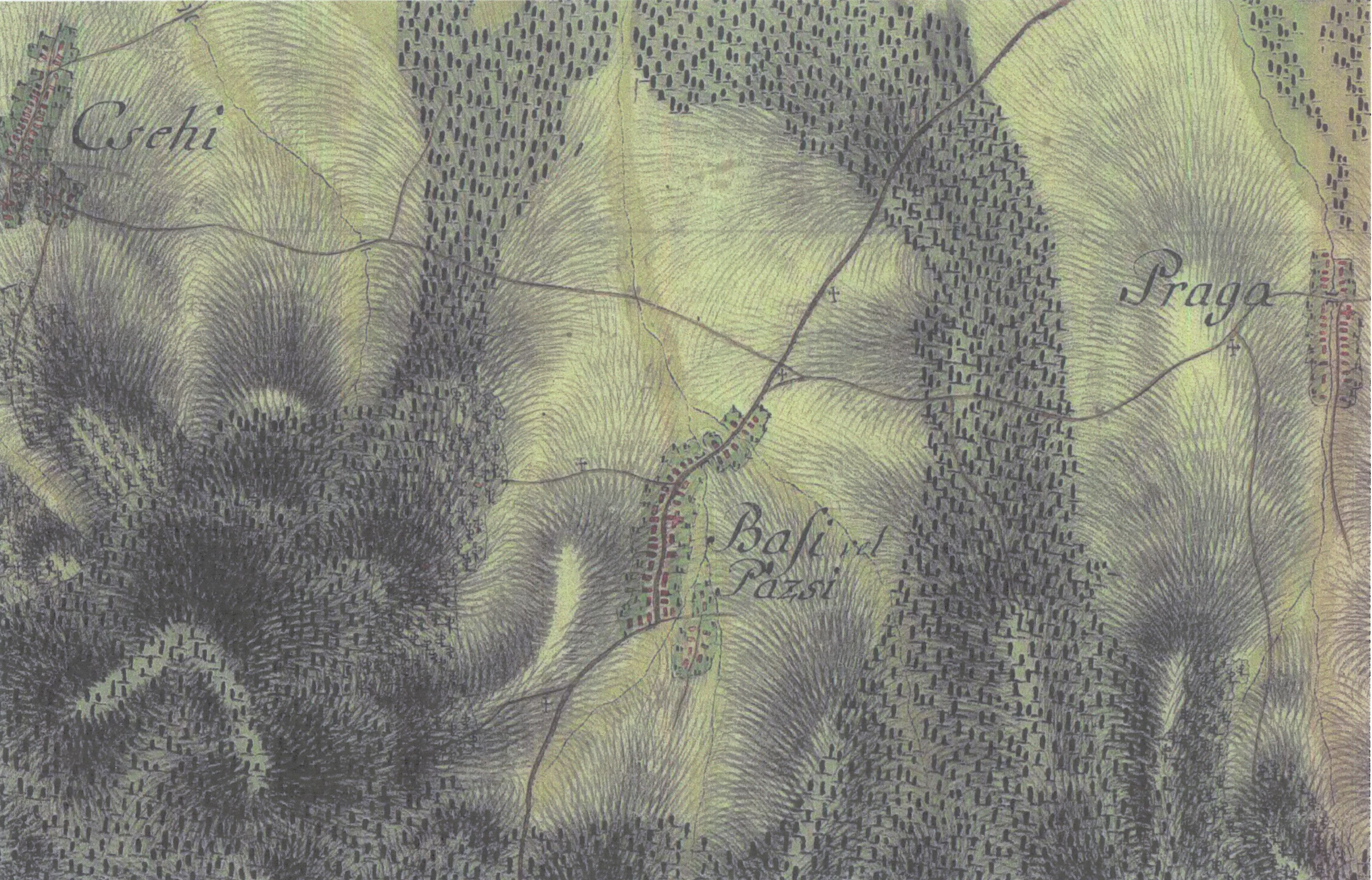 Térképszelvény Bazsi (Bosoy, Base, Basi, Pazsi, Pazi) községről II. József idejéből (1780-85): az "Első Katonai Felmérés" alapján